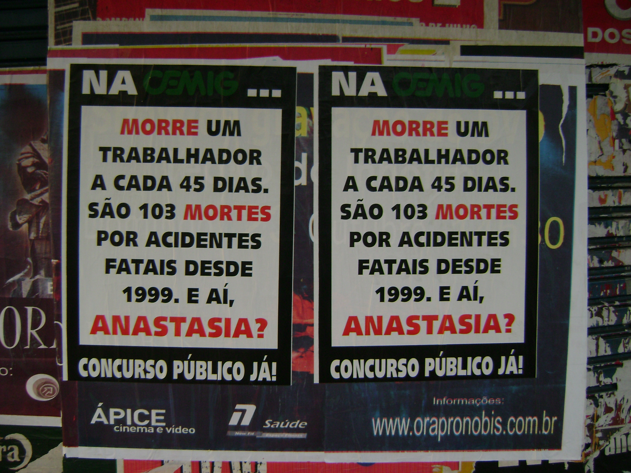 Cartazes afixados em frente ao Cefet-MG campus I, a pedir a realização de concursos públicos na CEMIG, em Belo Horizonte, Brasil.